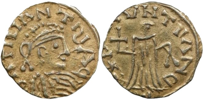 Tiers de sou de Gontran frappé à Chalon-sur-Saône (561-592). BNF, monnaies, médailles et antiques. Avers : Buste diadémé, drapé et cuirassé à droite. Revers : Victoire debout de face tenant une croix courte et une couronne.